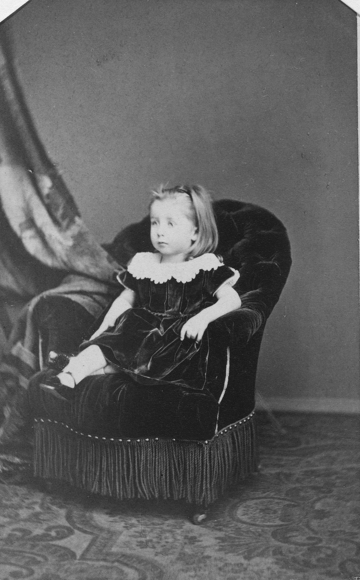 Baudouin, Prinz von Belgien.